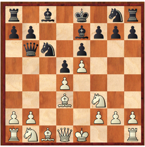 Ejemplo B